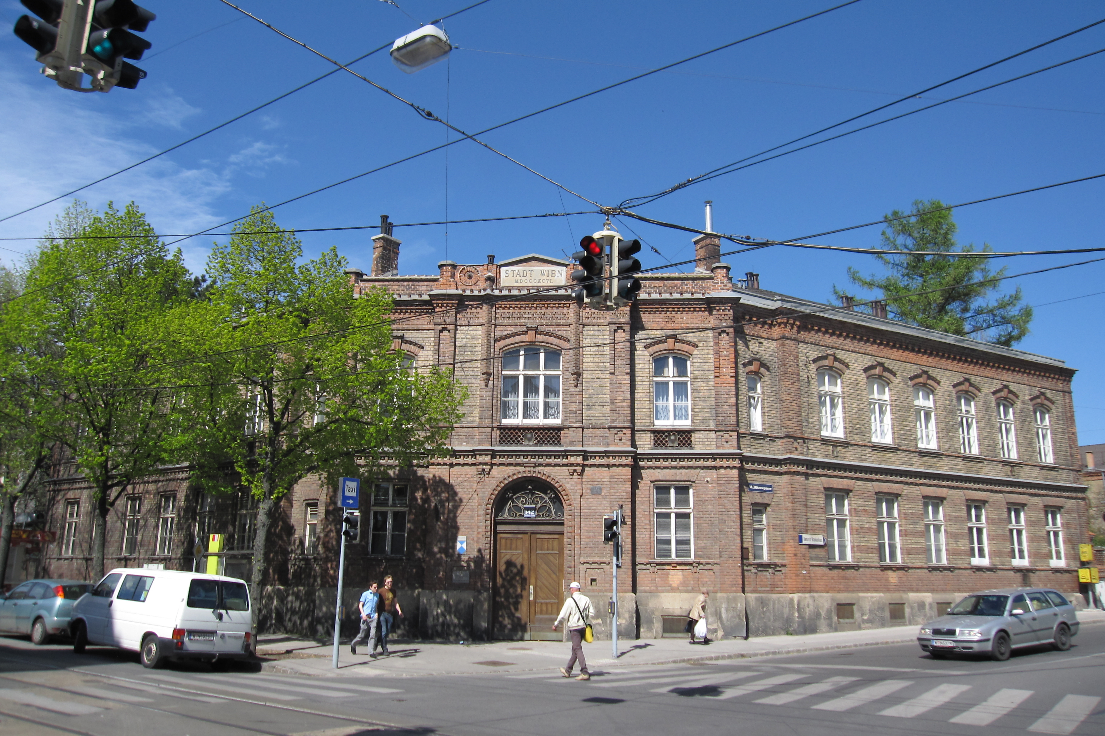 Das ehemalige Pumpwerk Breitensee der Wiener Wasserwerke in Wien-Penzing an der Hütteldorfer Straße 142.